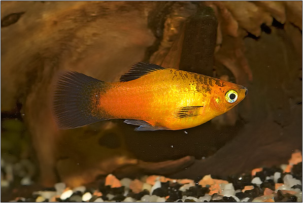 PLATY